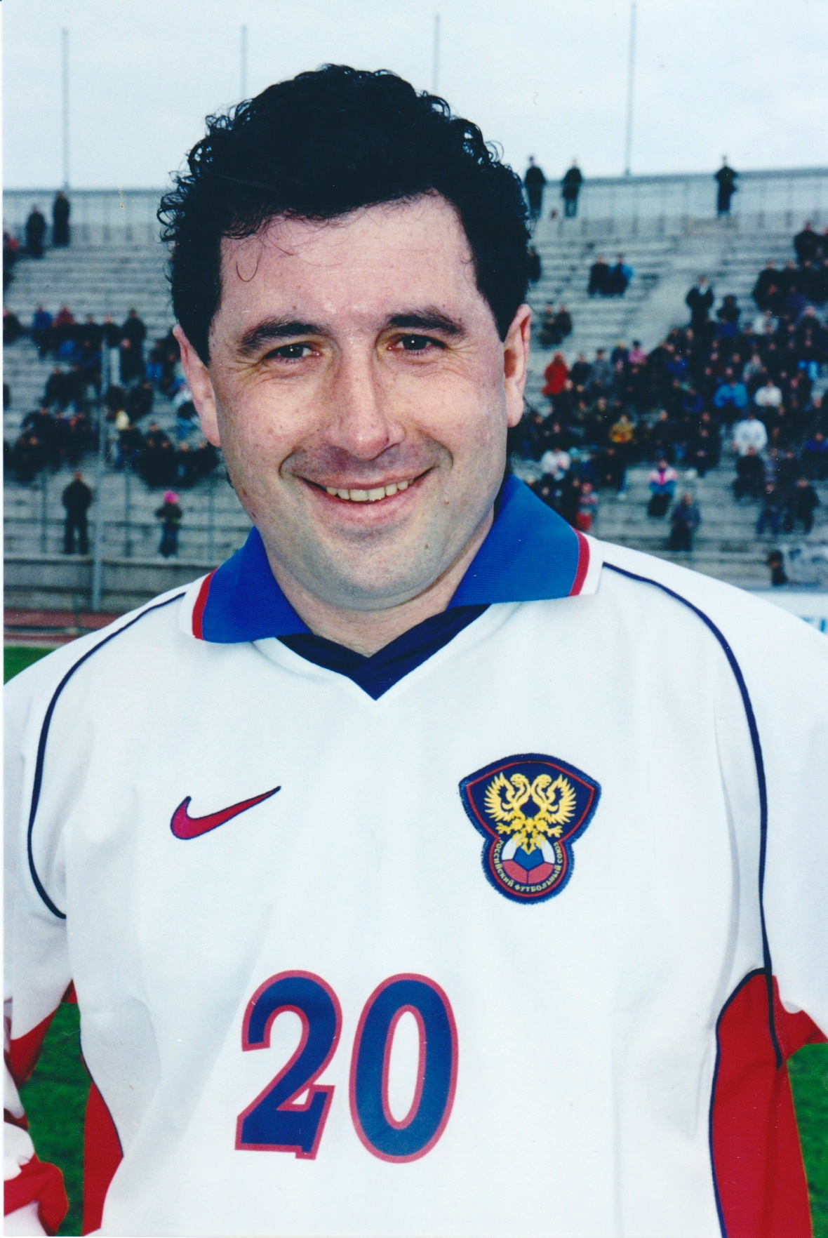 Матч ветеранов Сб. России и Сб. Франции